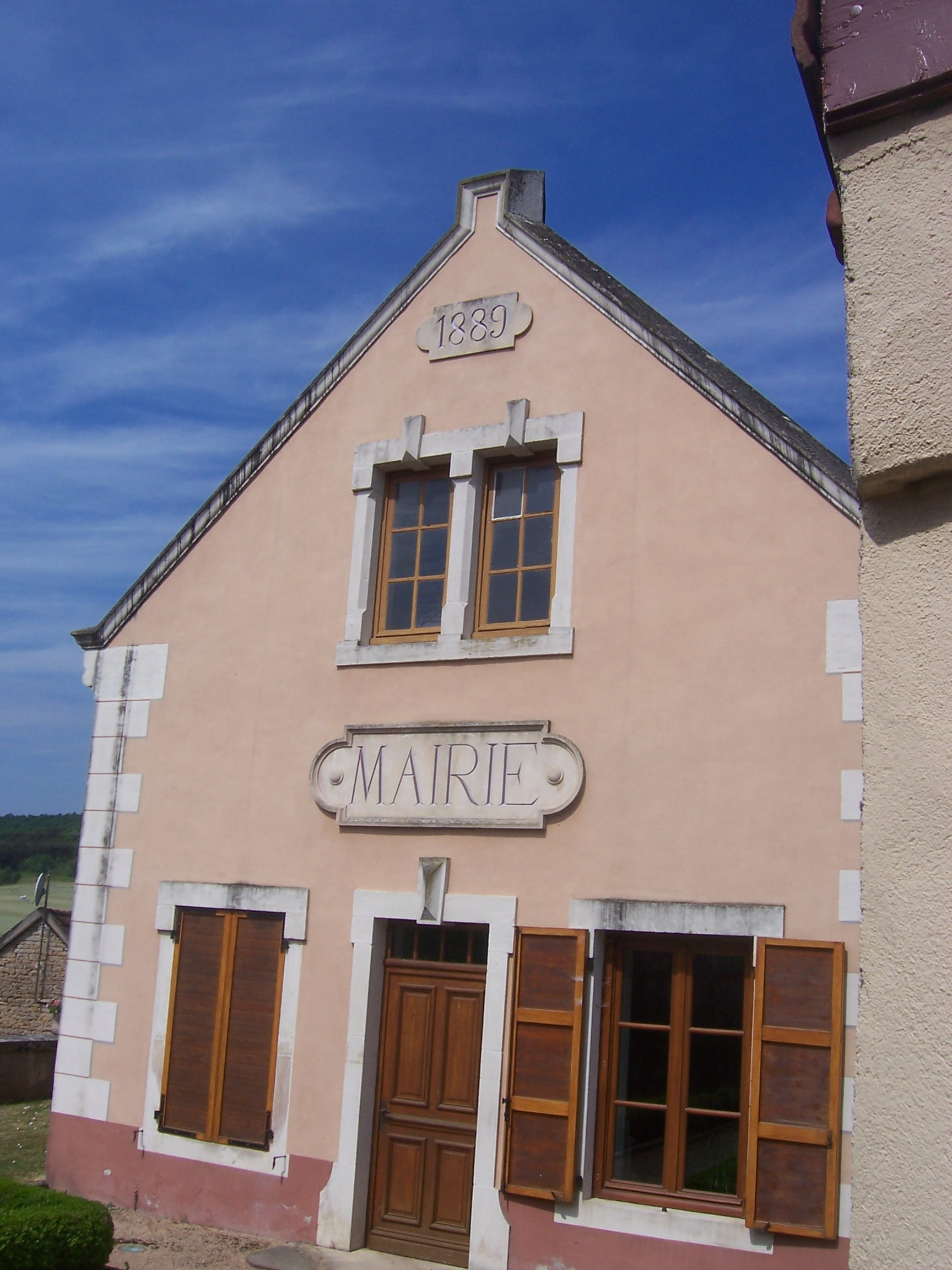 Mairie de Royer